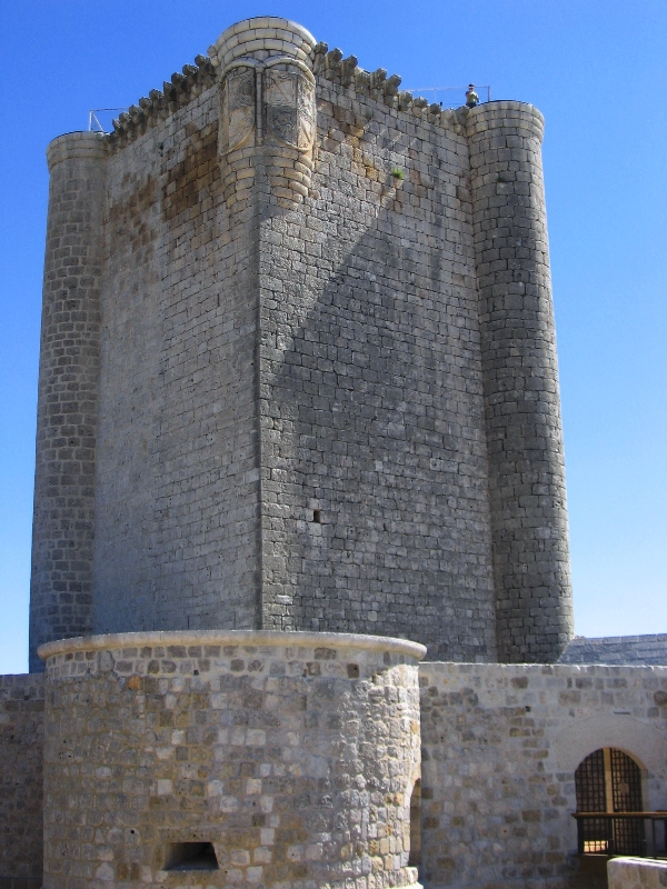 Castillo de Iscar (Valladolid)